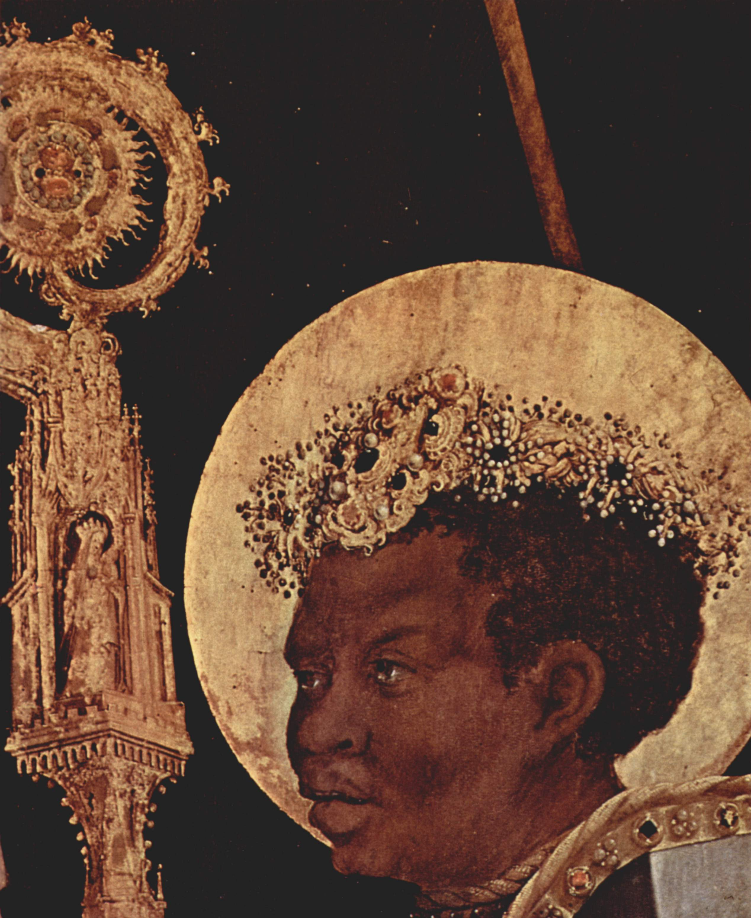 Begegnung des hl. Märtyrers Mauritius, des Anführers der thebaischen Legion, mit dem hl. Erasmus. Der hl. Mauritius war Patron des Stiftes und des Heiligen Römischen Reiches, der hl. Erasmus Patron des fürstlichen Hauses, dem Albrecht von Brandenburg entstammte. Erasmus trägt die Porträtzüge des Auftraggebers